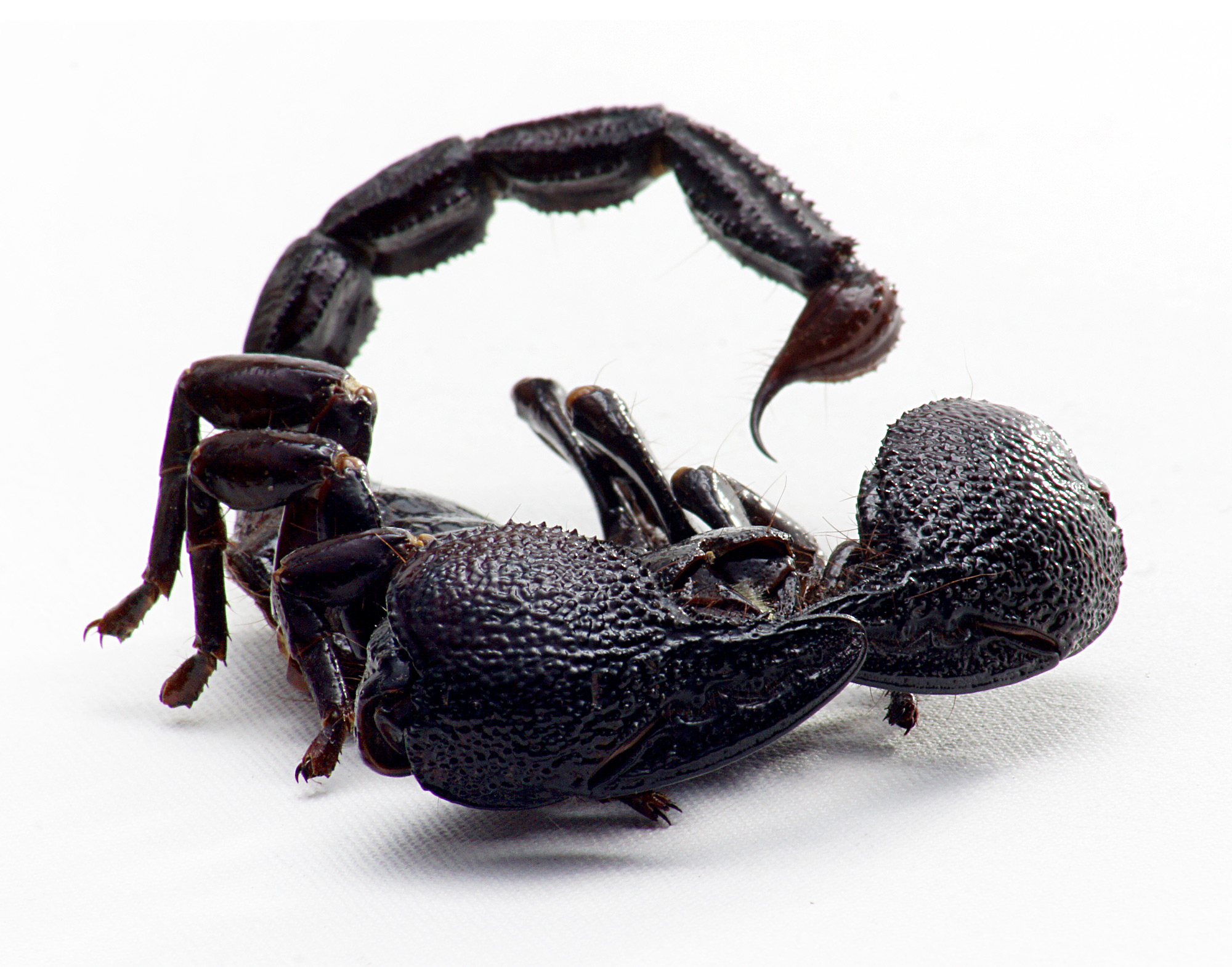 Pandinus Imperator.